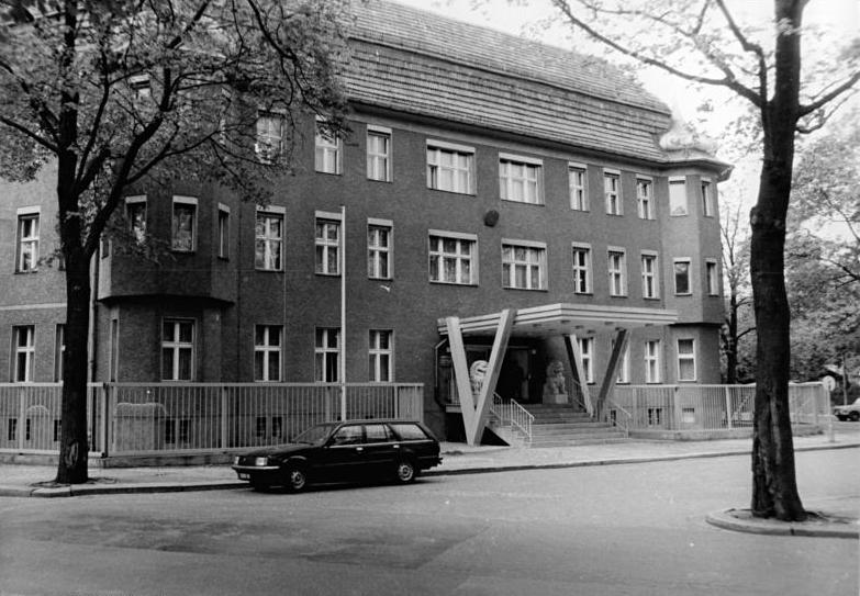 Berlin, Chinesische Botschaft ADN-ZB Schneider 3.1.87-Qua-Berlin: Botschaft der Volksrepublik China in der Heinrich-Mann-Straße 9.